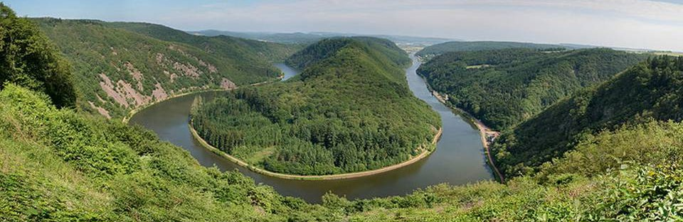 Saarschleife